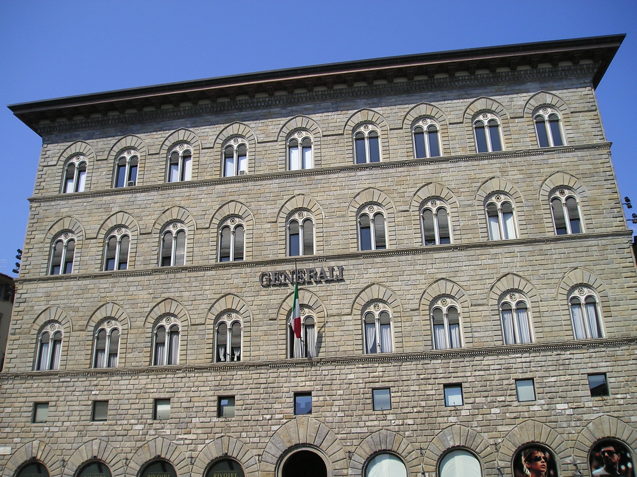 Facciata del palazzo delle Assicurazioni Generali a Firenze